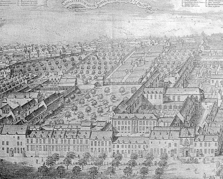 Omdat het klooster bestond van 1456 tot 1783 zal ook deze afbeelding uit die tijd stammen. Het gebruikte perspectief duidt daar ook op.